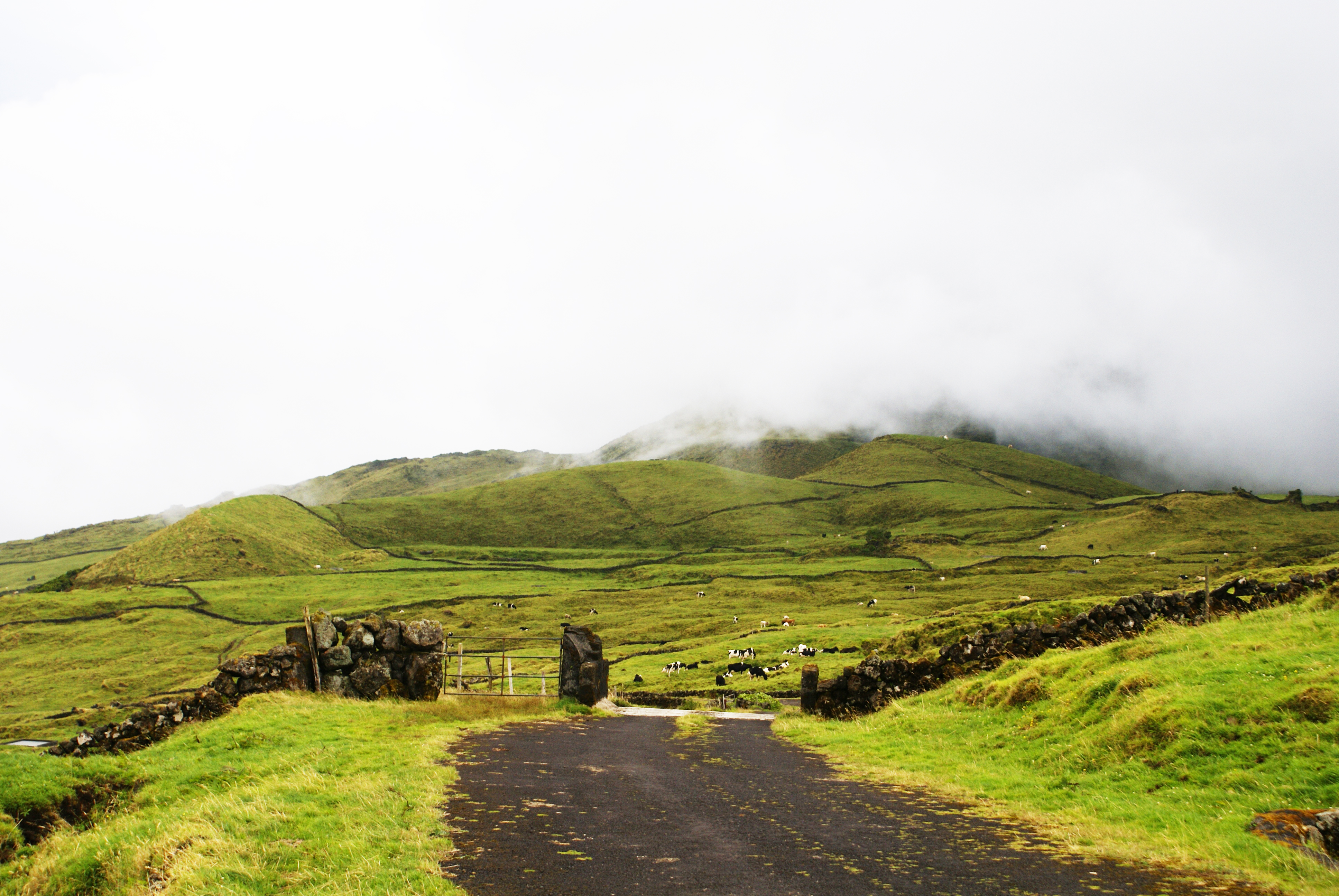 Interior montanhoso da ilha do Pico, as novens descem a serra, Açores, Portugal